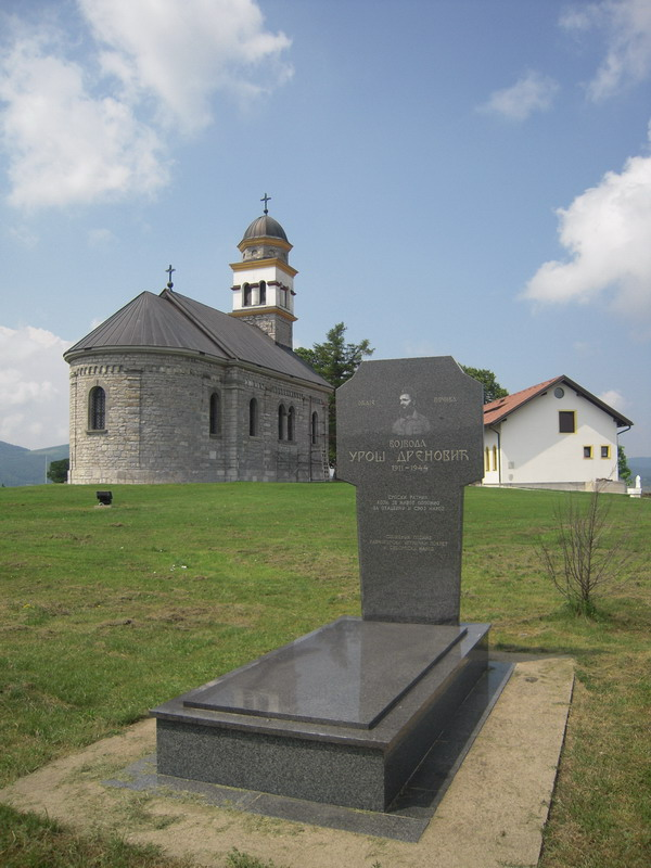 Grob_Uroša_Drenovića_i_crkva_Klisina